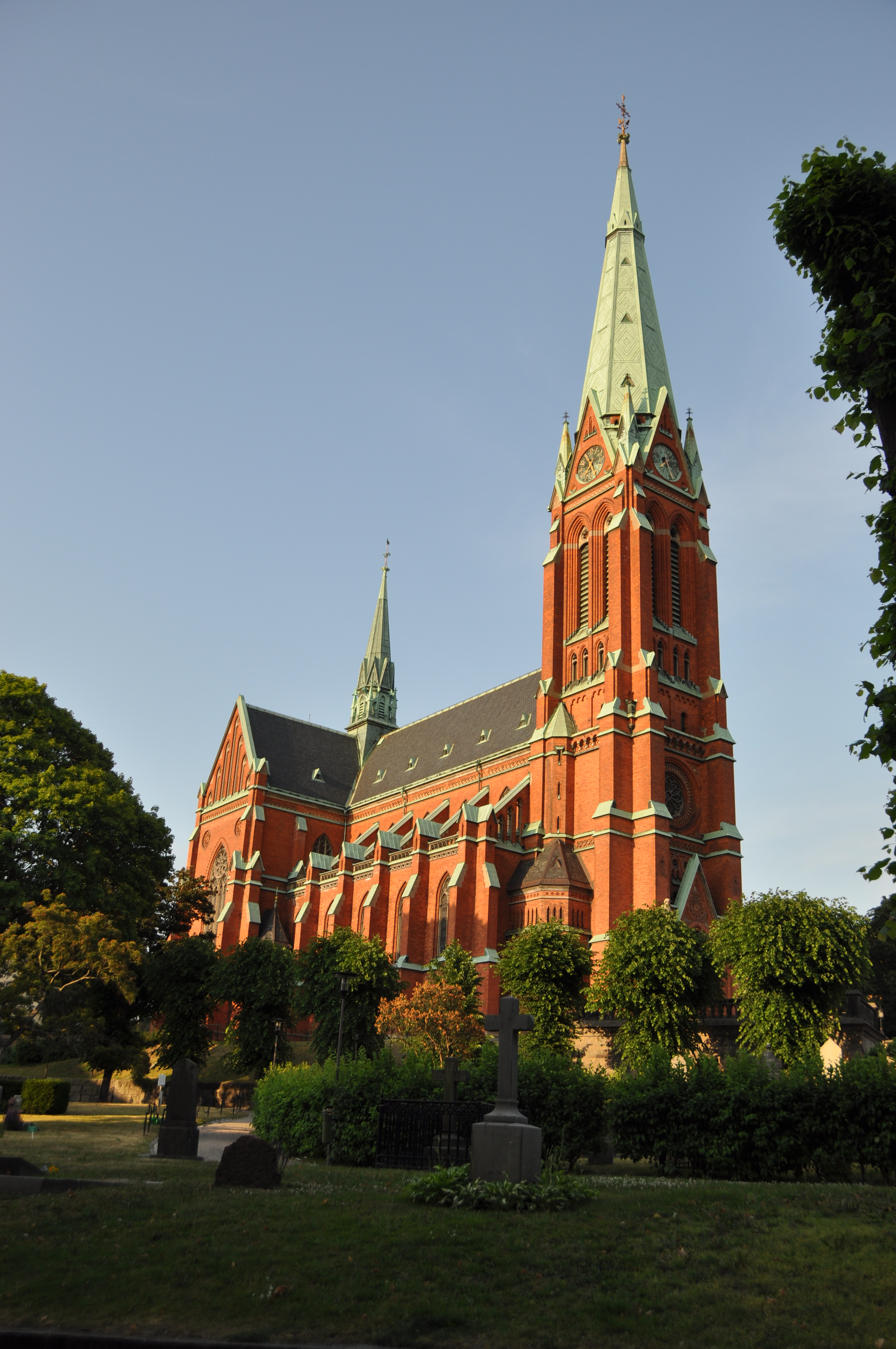 Johannes kyrka 2010